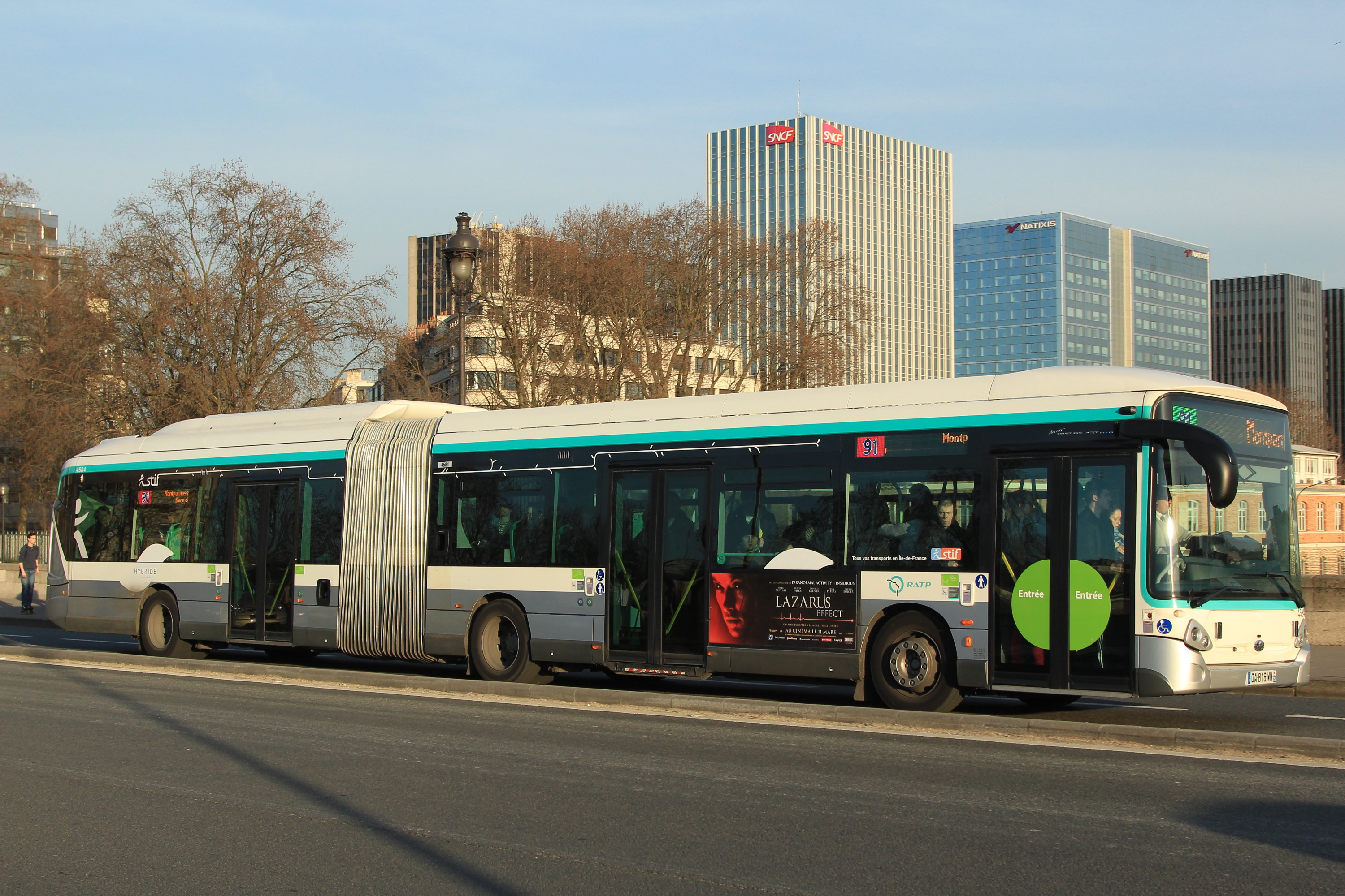 Un bus de type GX 427 hybride de la ligne 91 de la RATP sur le Pont d'Austerlitz à Paris.